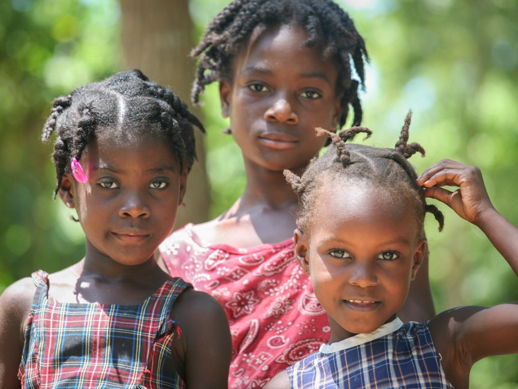 Haitian girls